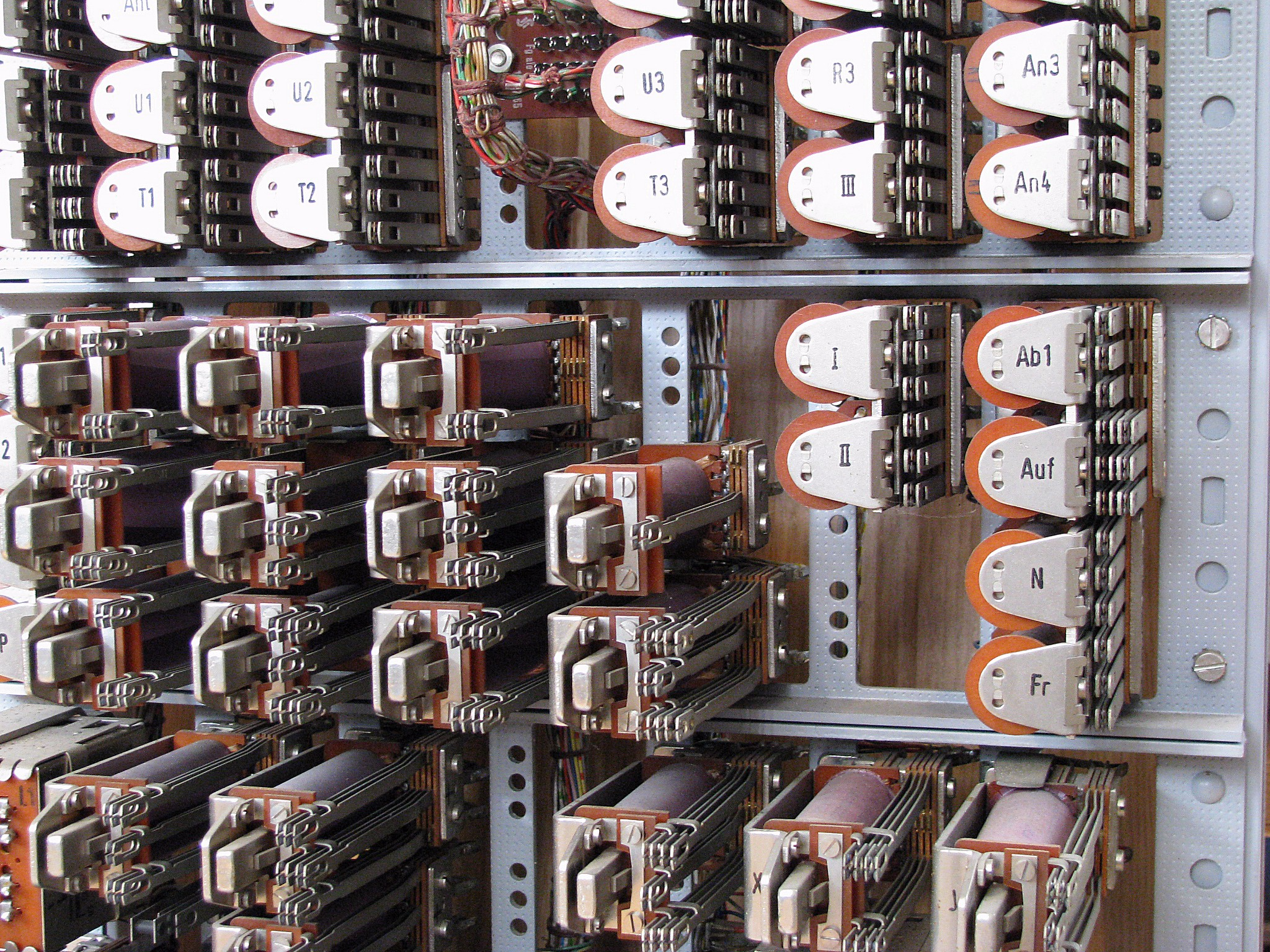 Flach- und Rundrelais in einer Nebenstellenanlage für drei Teilnehmer